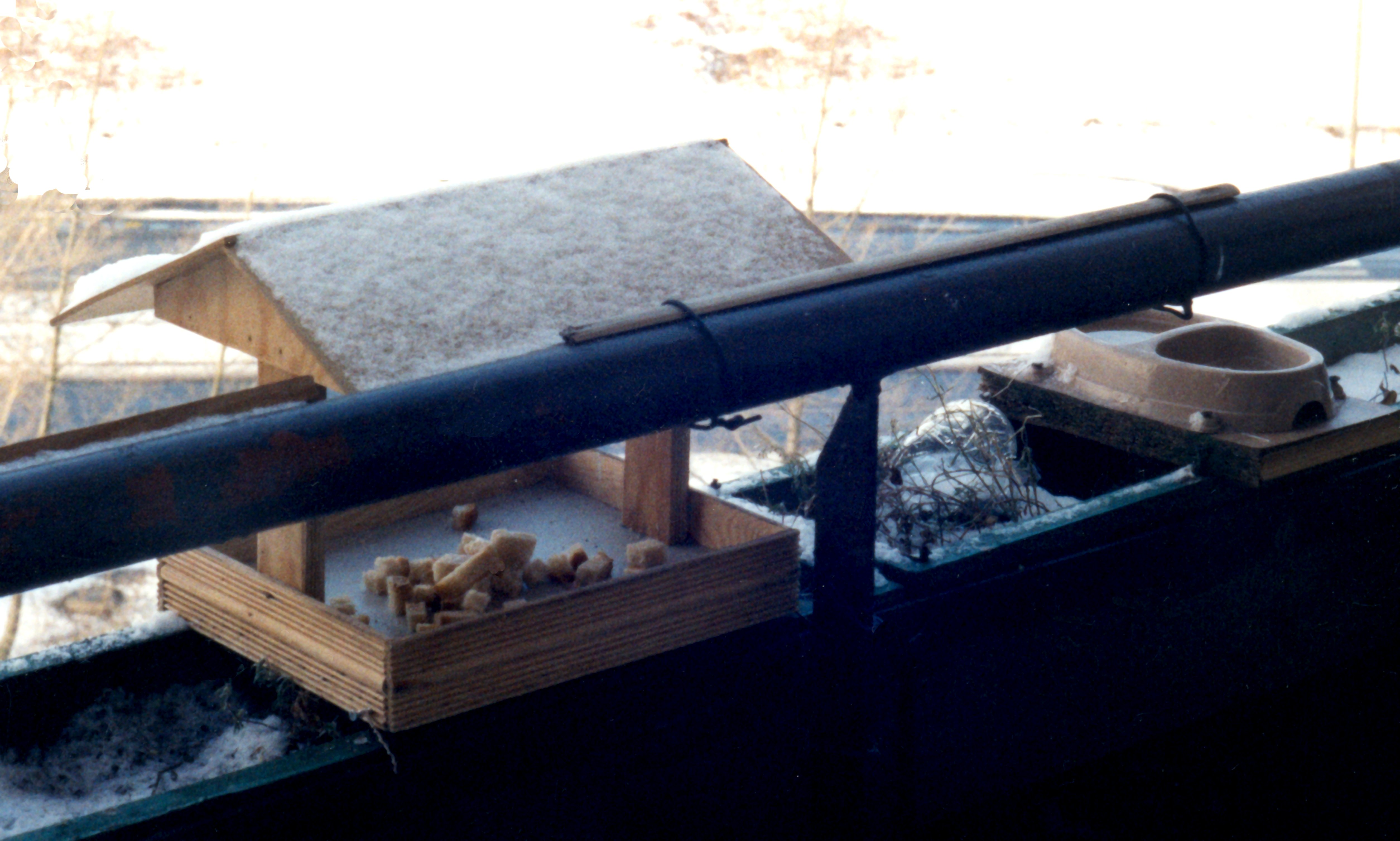 Feeder